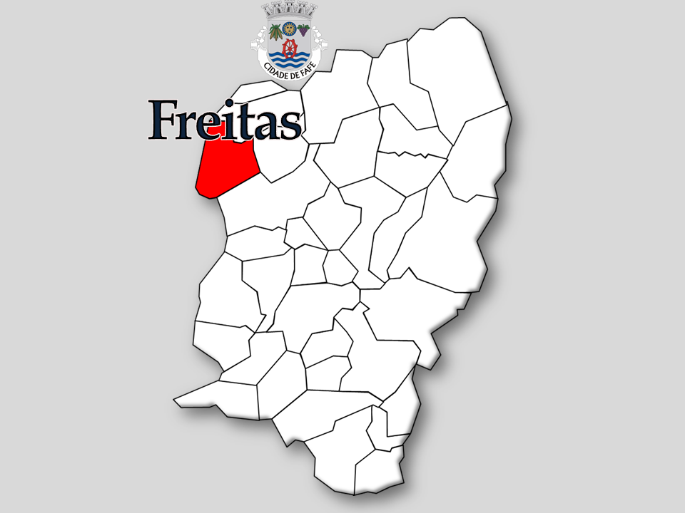 Censos 1864/2011